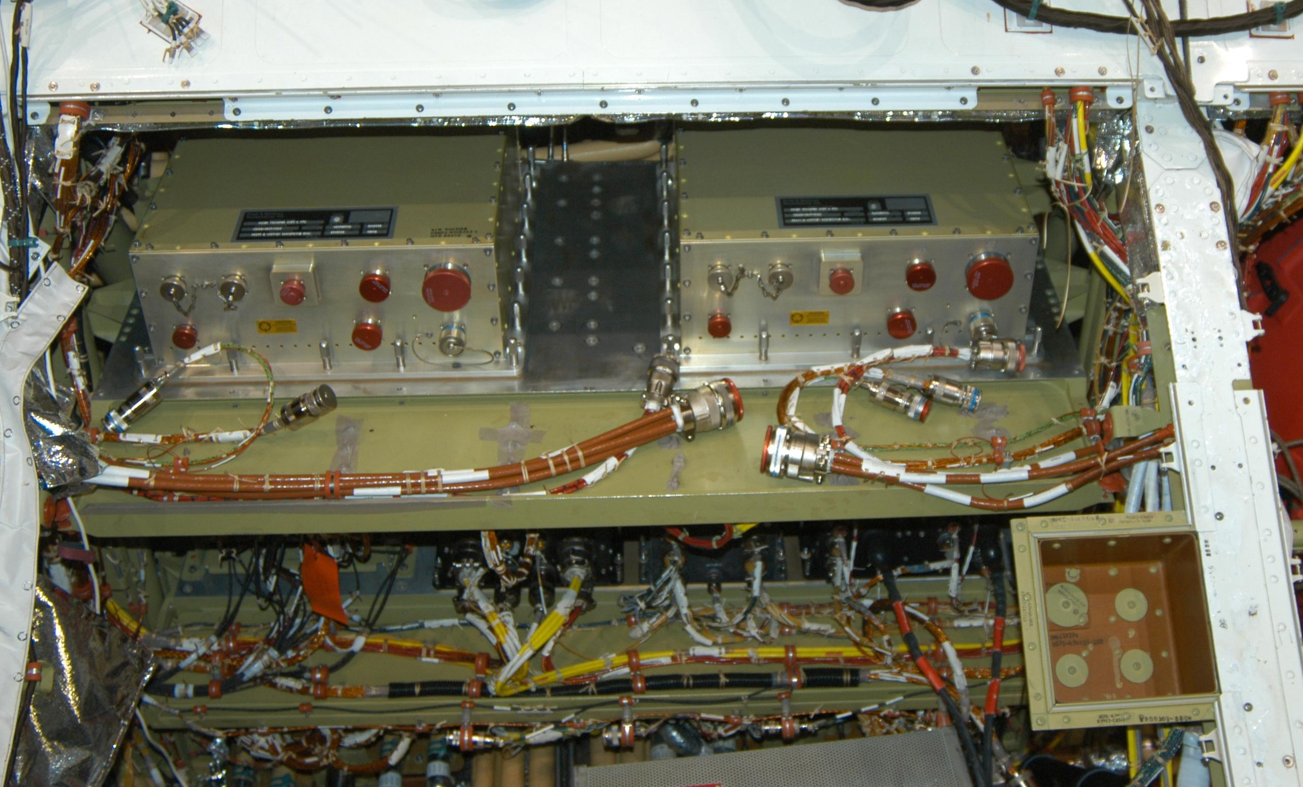 Power Transfer Unit (PTU) Flight Unit #1